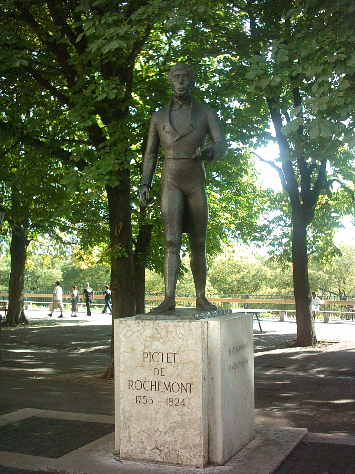 Statue de Charles Pictet de Rochemont à Genève (Suisse)